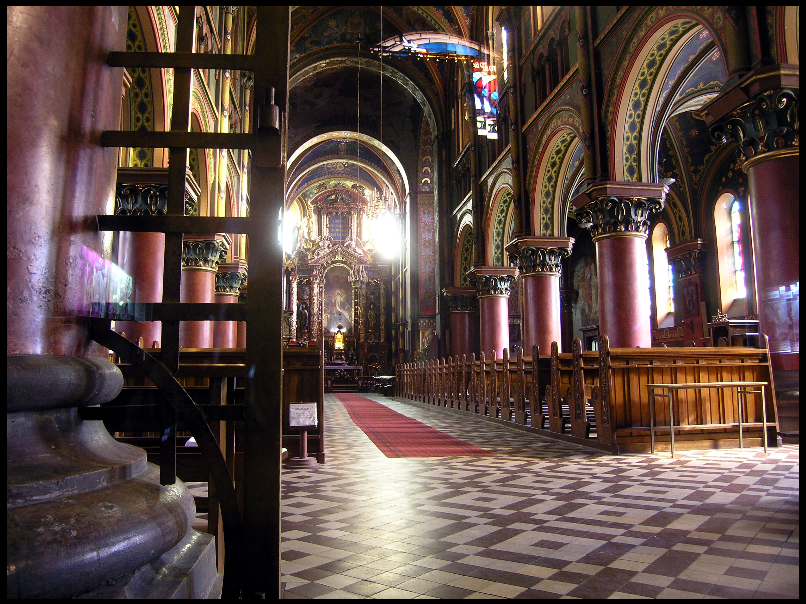 Katedra Diecezjalna pw. Najświętrzej Maryi Panny w Sosnowcu, wnętrze